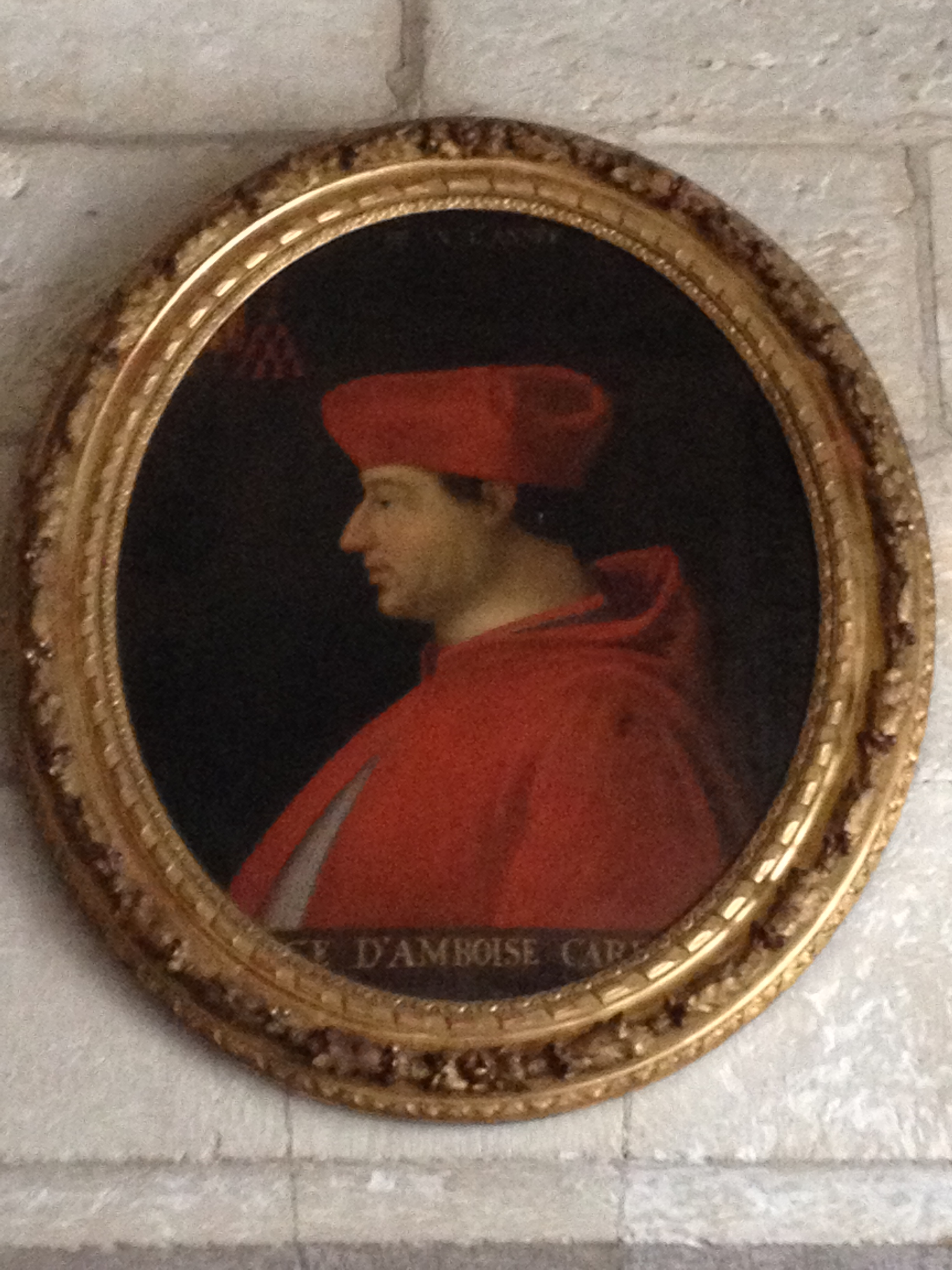 Peinture de Georges d'Amboise, archevêque de Rouen, dans les salles basses de l'archevêché de Rouen.